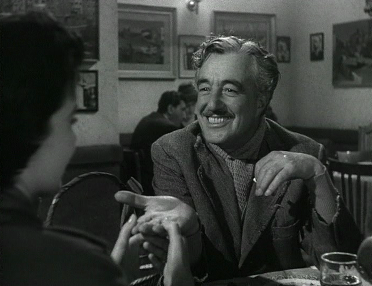 Screenshot del film Il segno di Venere (1955) di Dino Risi.